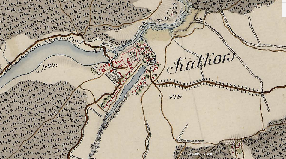 xviii